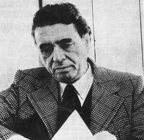 Fotografía del poeta y compositor uruguayo Osiris Rodríguez Castillos